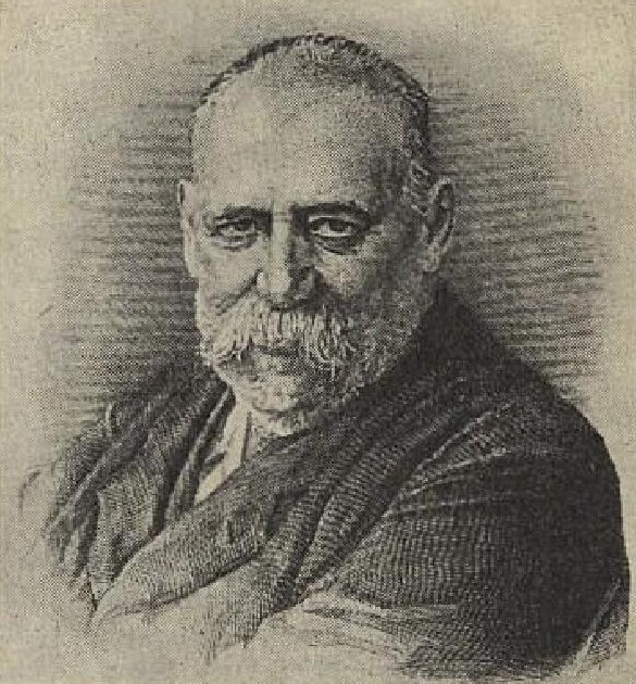 Eduard Karel (1861-1950), český rytec, grafik, malíř a pedagog